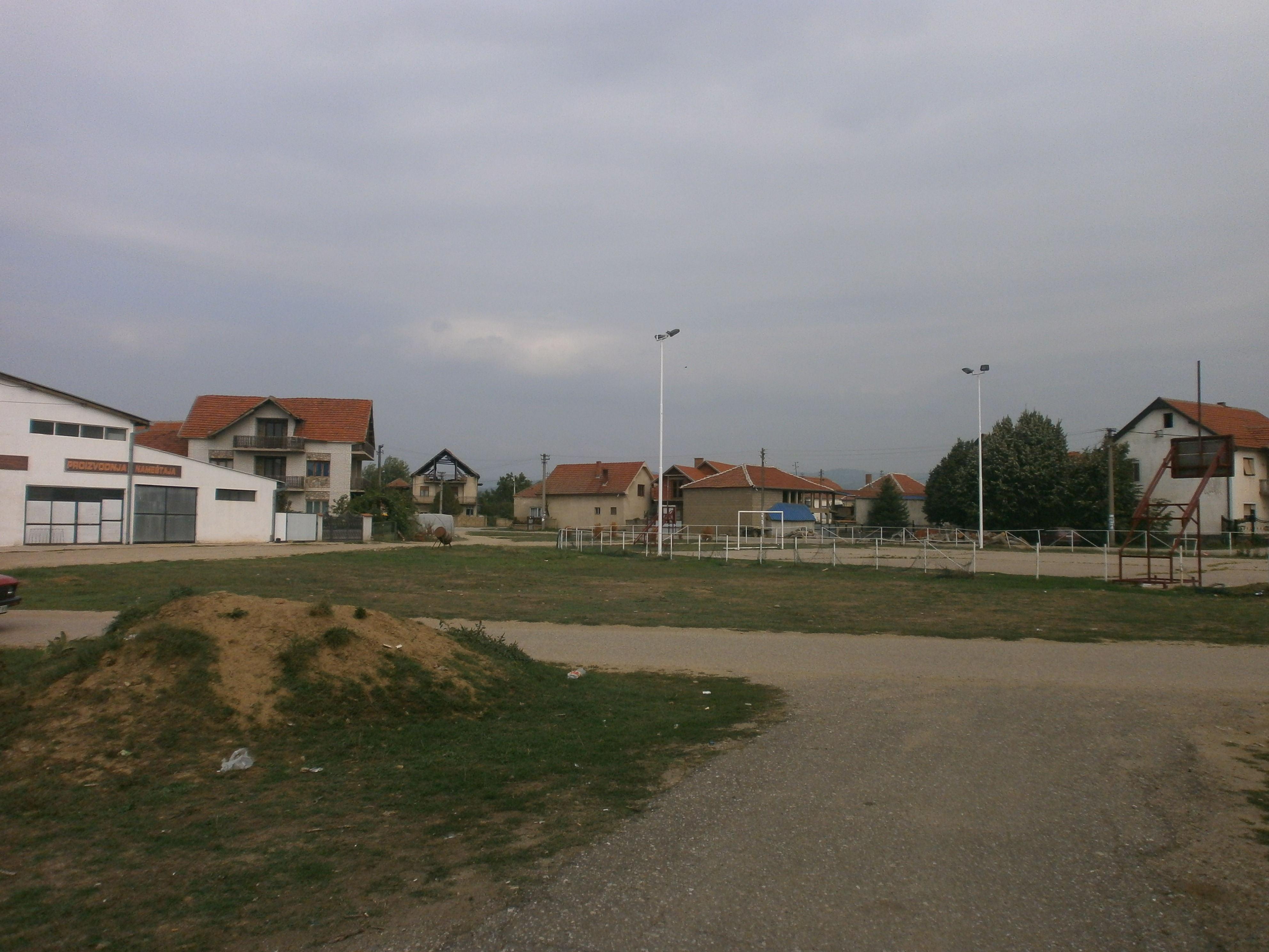 Srpski (latinica): Kumarevo, Leskovac